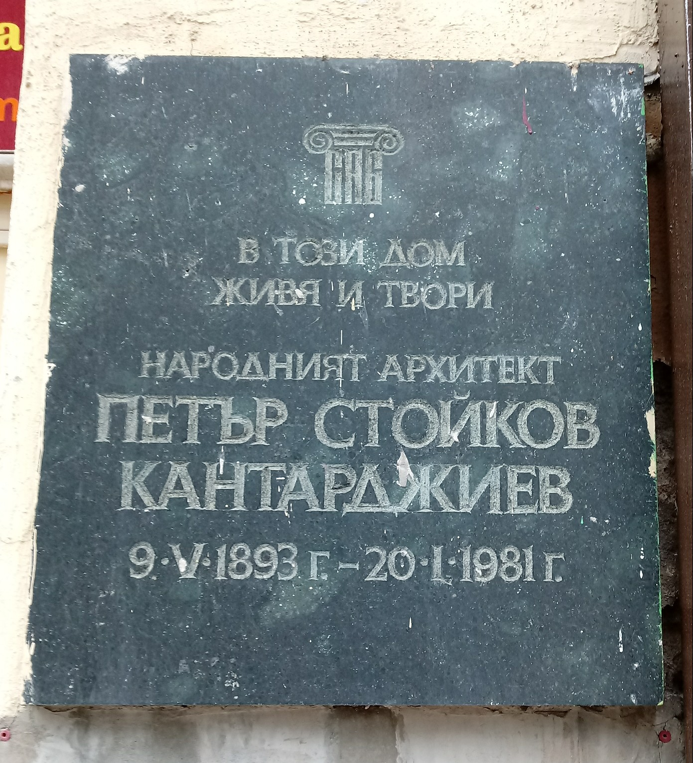 Petar Kantardzhiev memorial plaque, 7A Aksakov Str., Sofia